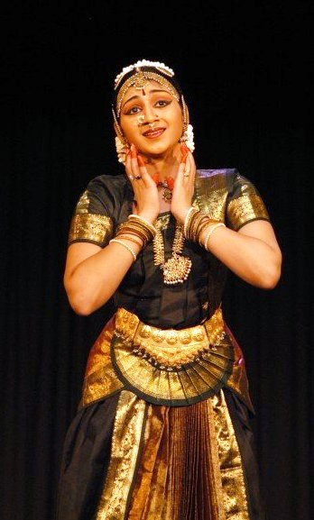 This picture is of my sister